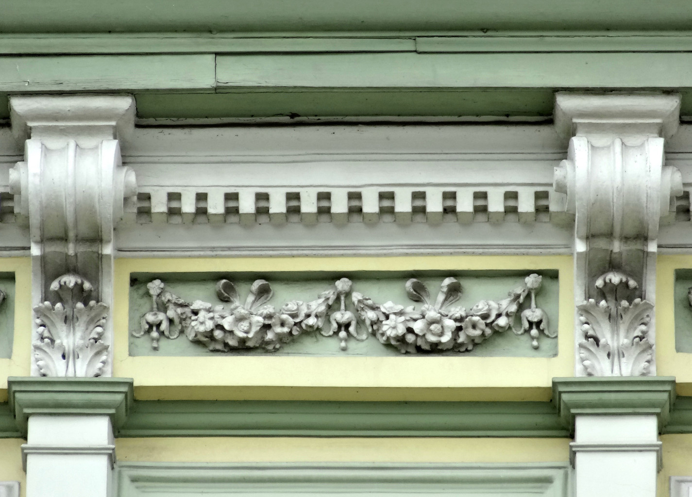 Kamienica Stary Rynek 1 w Bydgoszczy